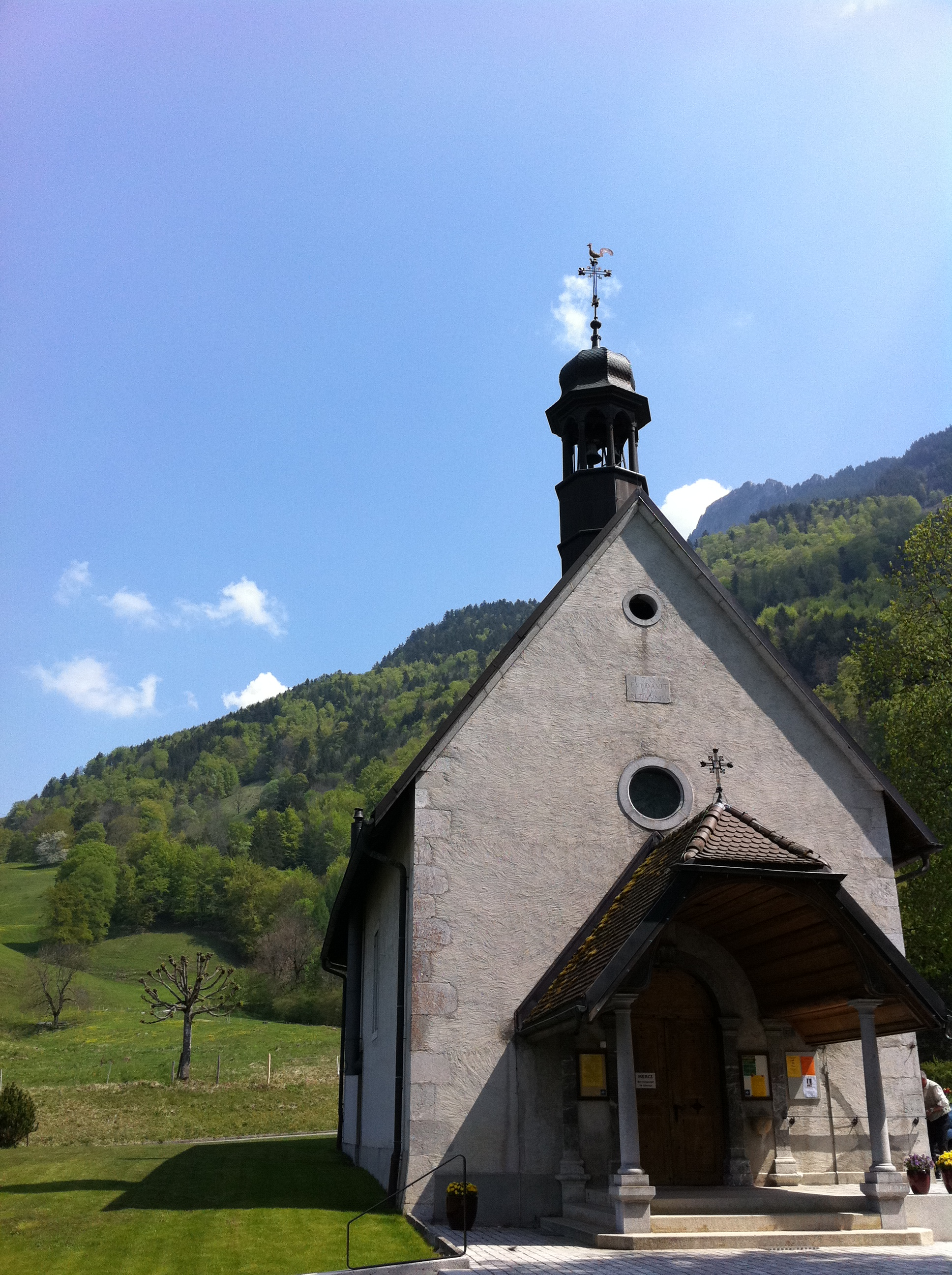 église de Notre-Dame des Marches, Fribourg, Suisse